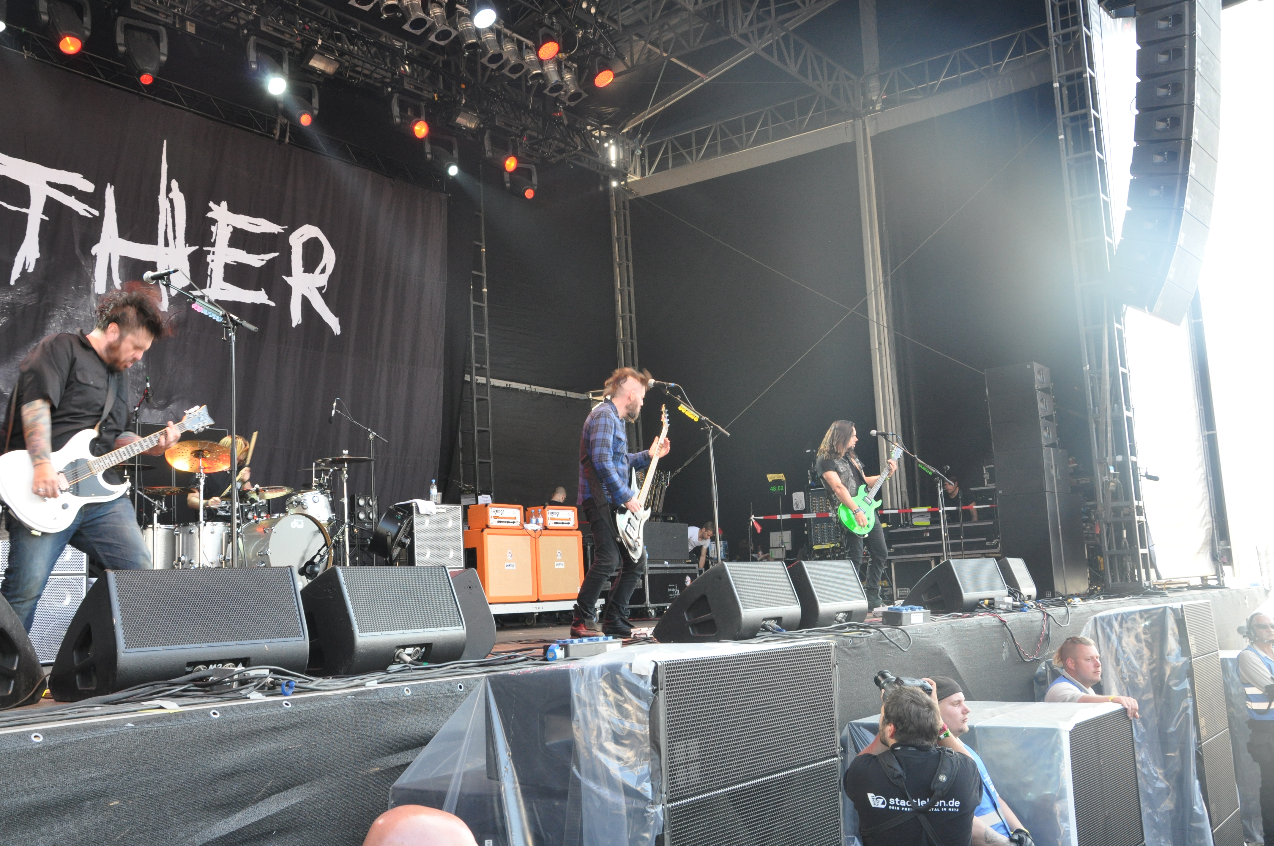 Seether auf der Clubstage bei Rock am Ring 2014